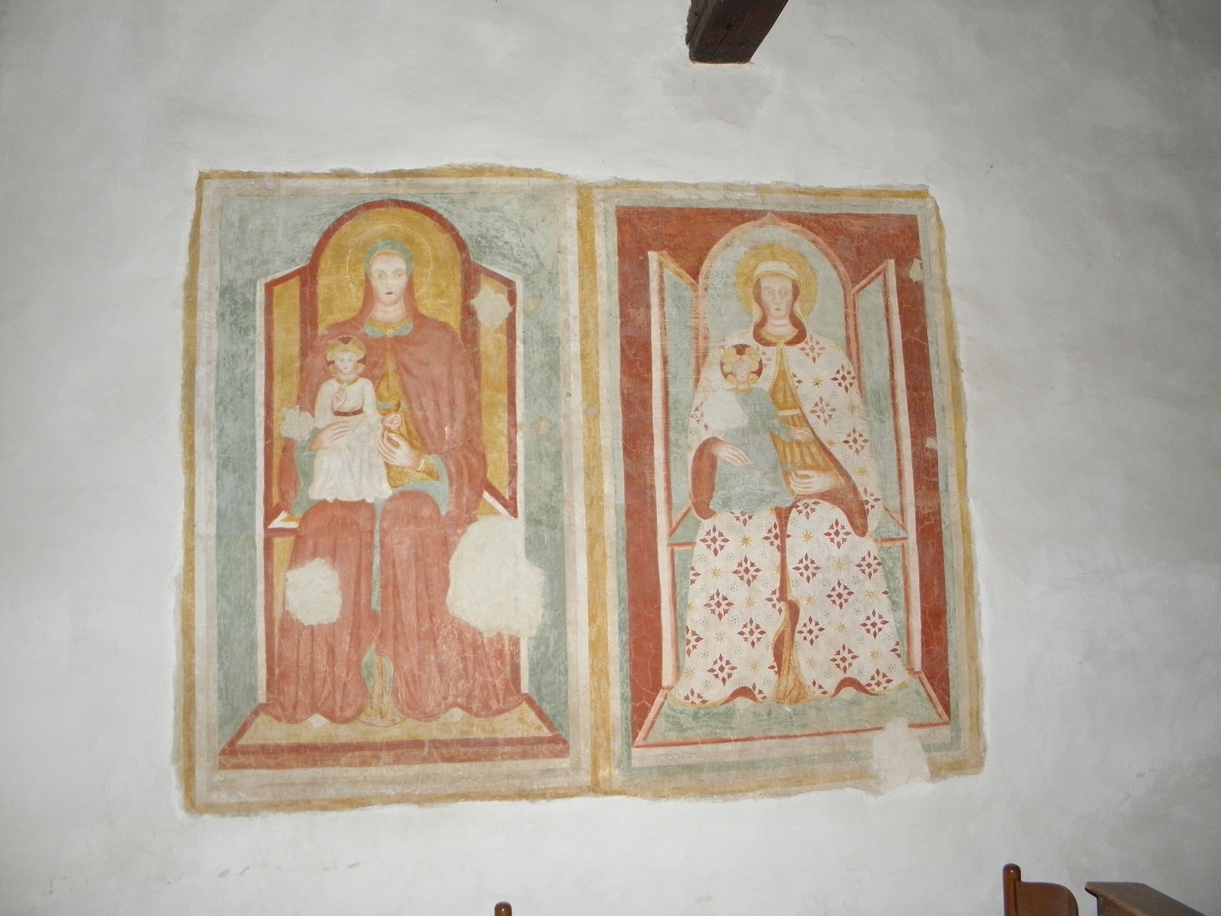 Saletto, interno della chiesa romanica di San Silvestro (X-XI secolo). Uno degli affreschi laterali raffiguranti la Madonna col Bambino seduta in trono (Maestà).